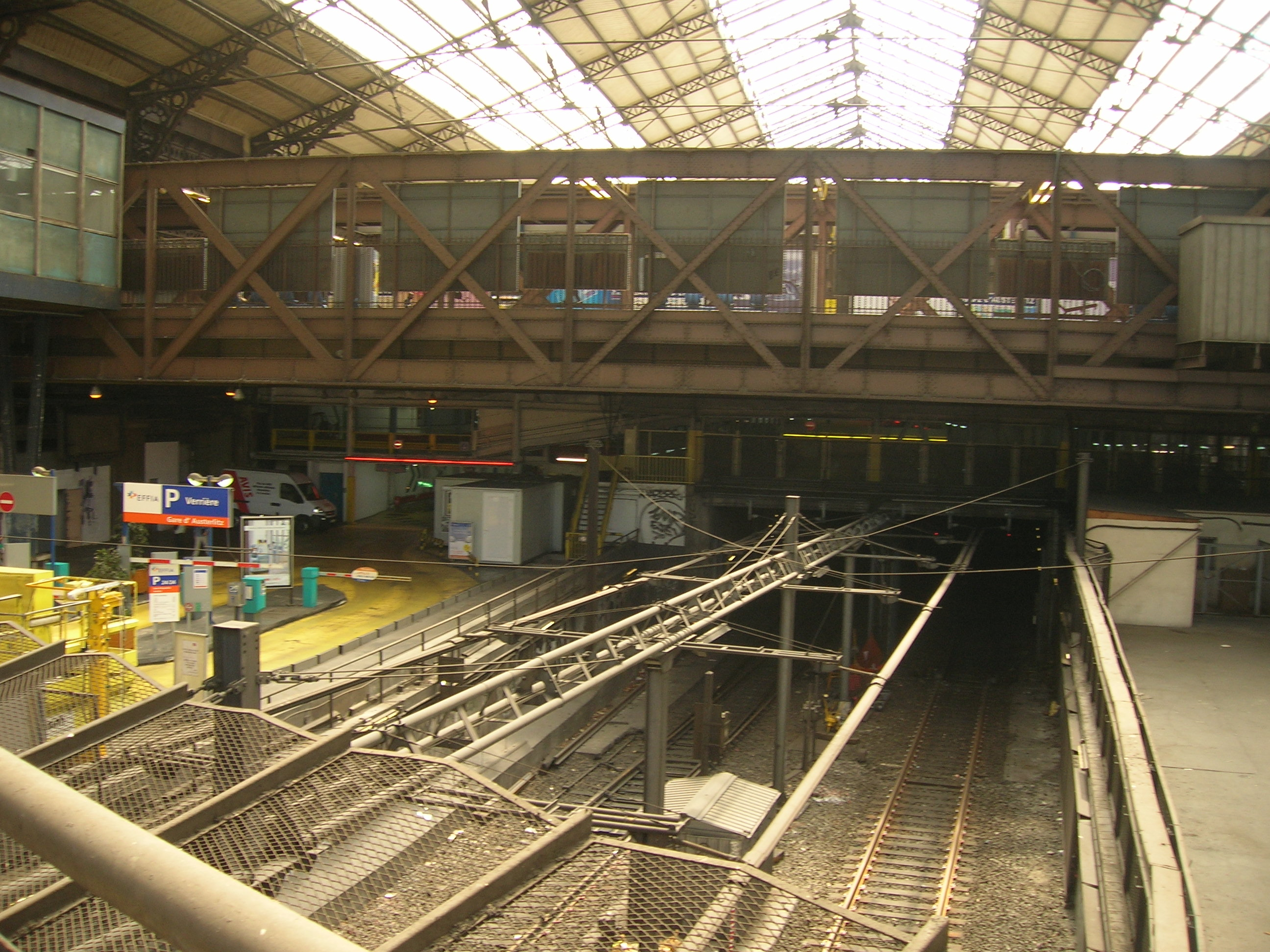 Gare d'Austerlitz, Paris. Vue du fond la verrière, voies RER C et viaduc station de métro (ligne 5)